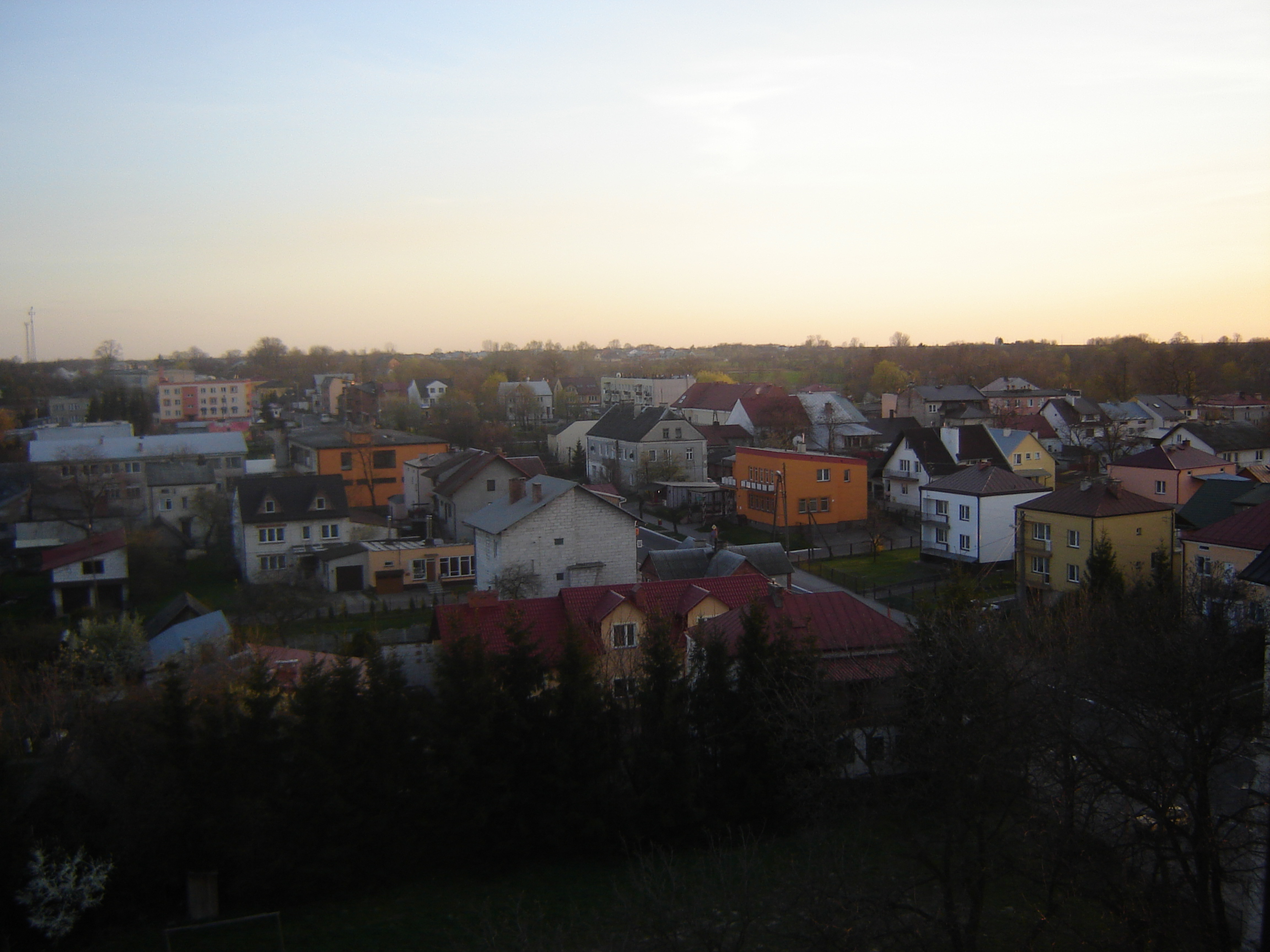 widok z wieży kościelnej na miasto